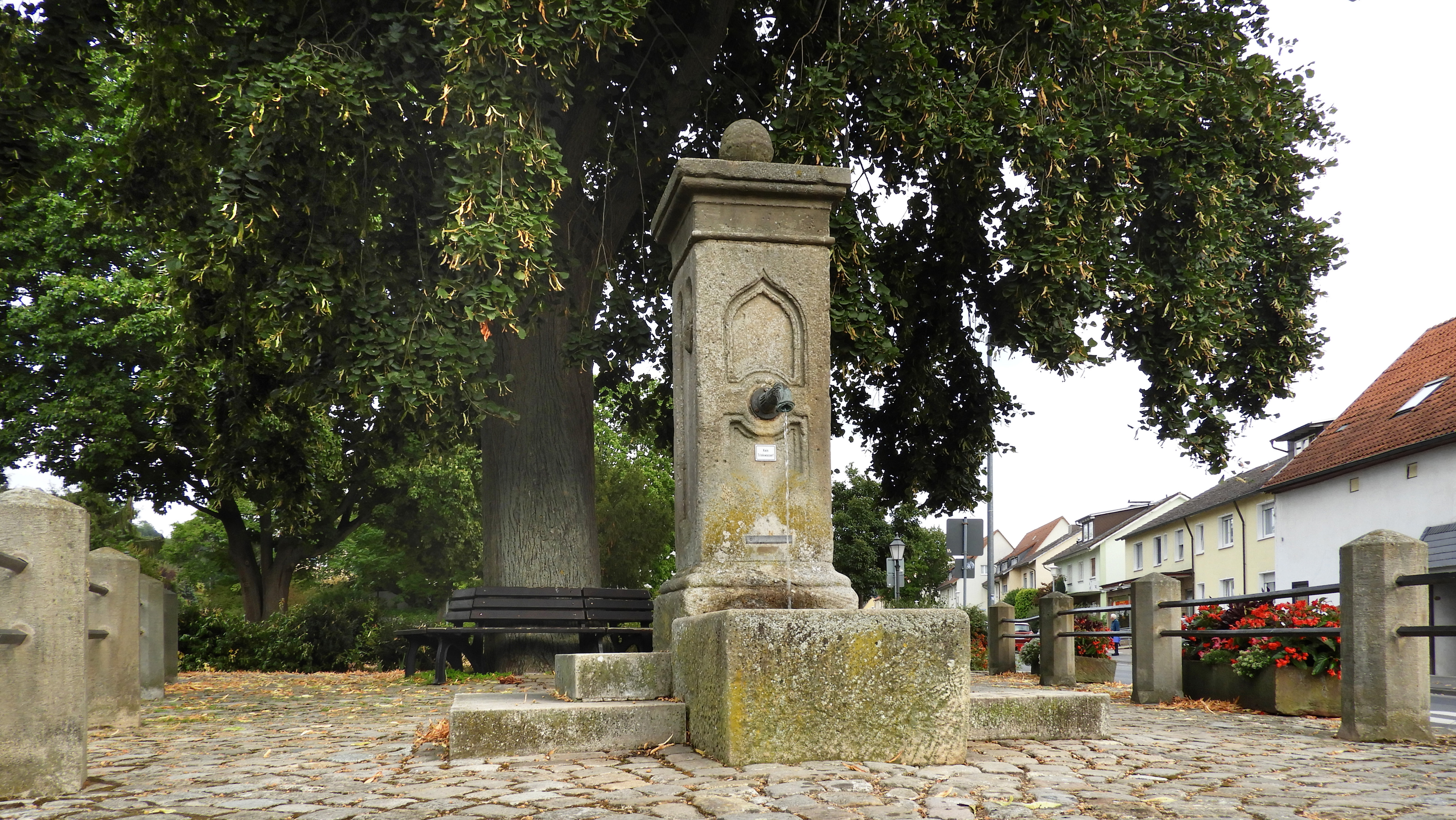 Der Zimmersbrunnen. Inspiriert von der „Linde am Brunnen vor dem Tore“ im nordhessischen Bad Sooden-Allendorf soll Wilhelm Müller, so wird überliefert, das Gedicht „Der Lindenbaum“ geschrieben haben. Berühmt wurden die Verse als „Am Brunnen vor dem Tore“ durch die Vertonung von Franz Schubert und durch die Bearbeitung von Friedrich Silcher. Die fast 700 Jahre alt gewordene „Original“-Linde fiel im Mai 1912 einem Sturm zum Opfer. Im Jahr 1914 wurde eine neue Linde an ihrer Stelle gepflanzt, die inzwischen stattliche Ausmaße erreicht hat. Der Baum steht seit 1936 als Naturdenkmal mit der Nummer ND 636.008 unter besonderem Schutz und gehört zu einer als Kulturdenkmal aus geschichtlichen Gründen geschützten Anlage.